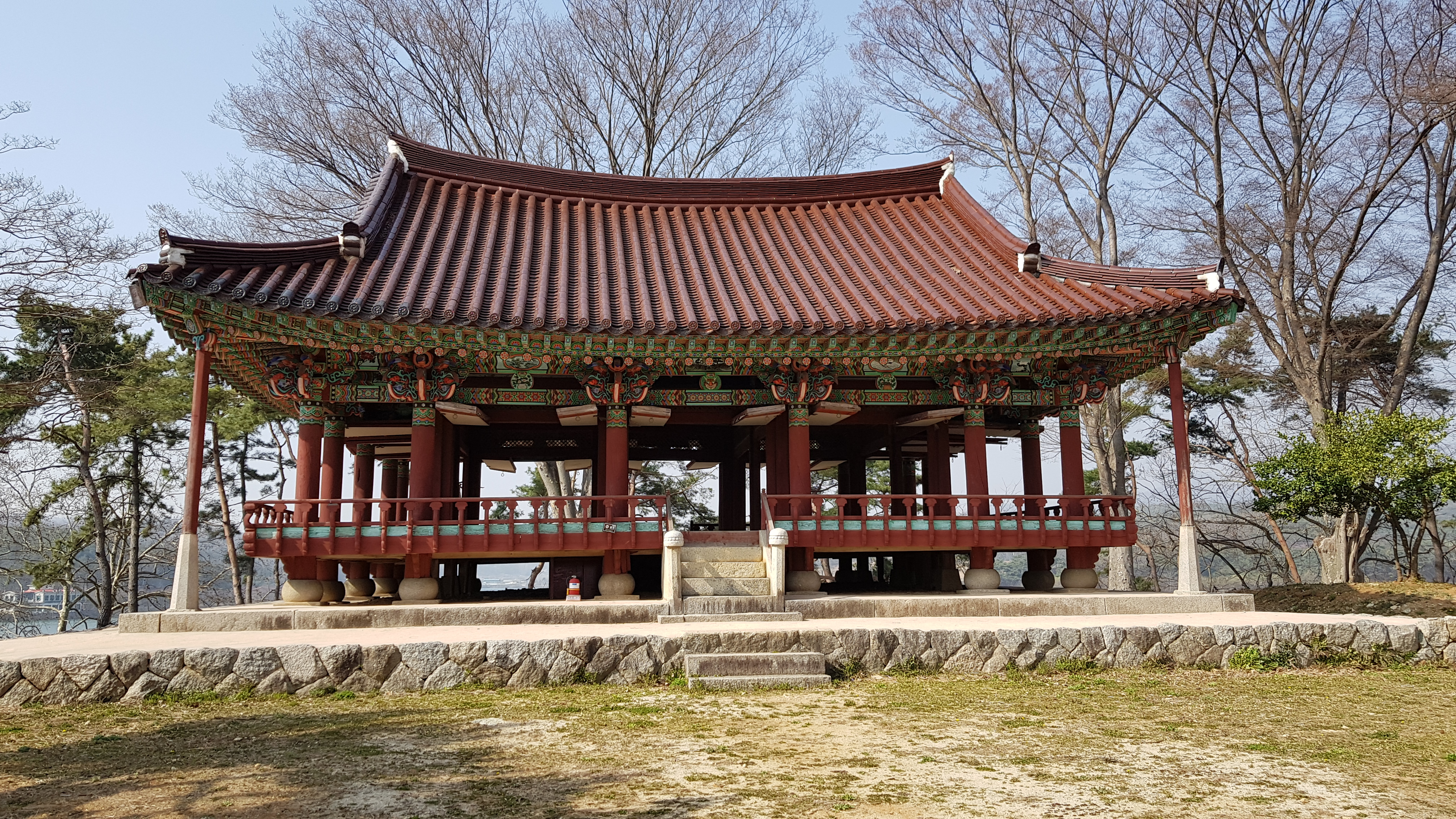 함벽정 정자 익산시